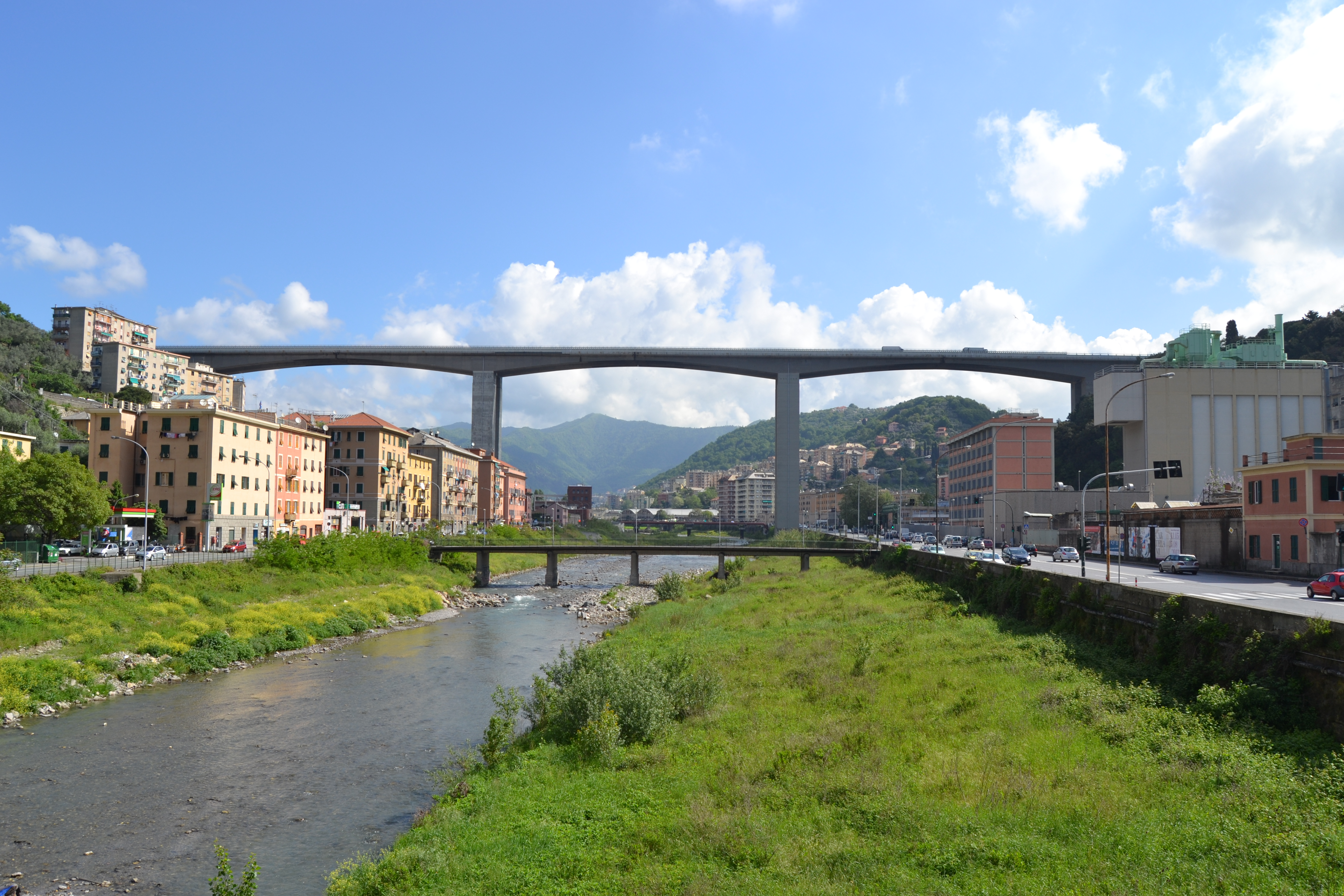 Viadotto Bisagno sull'autostrada A12